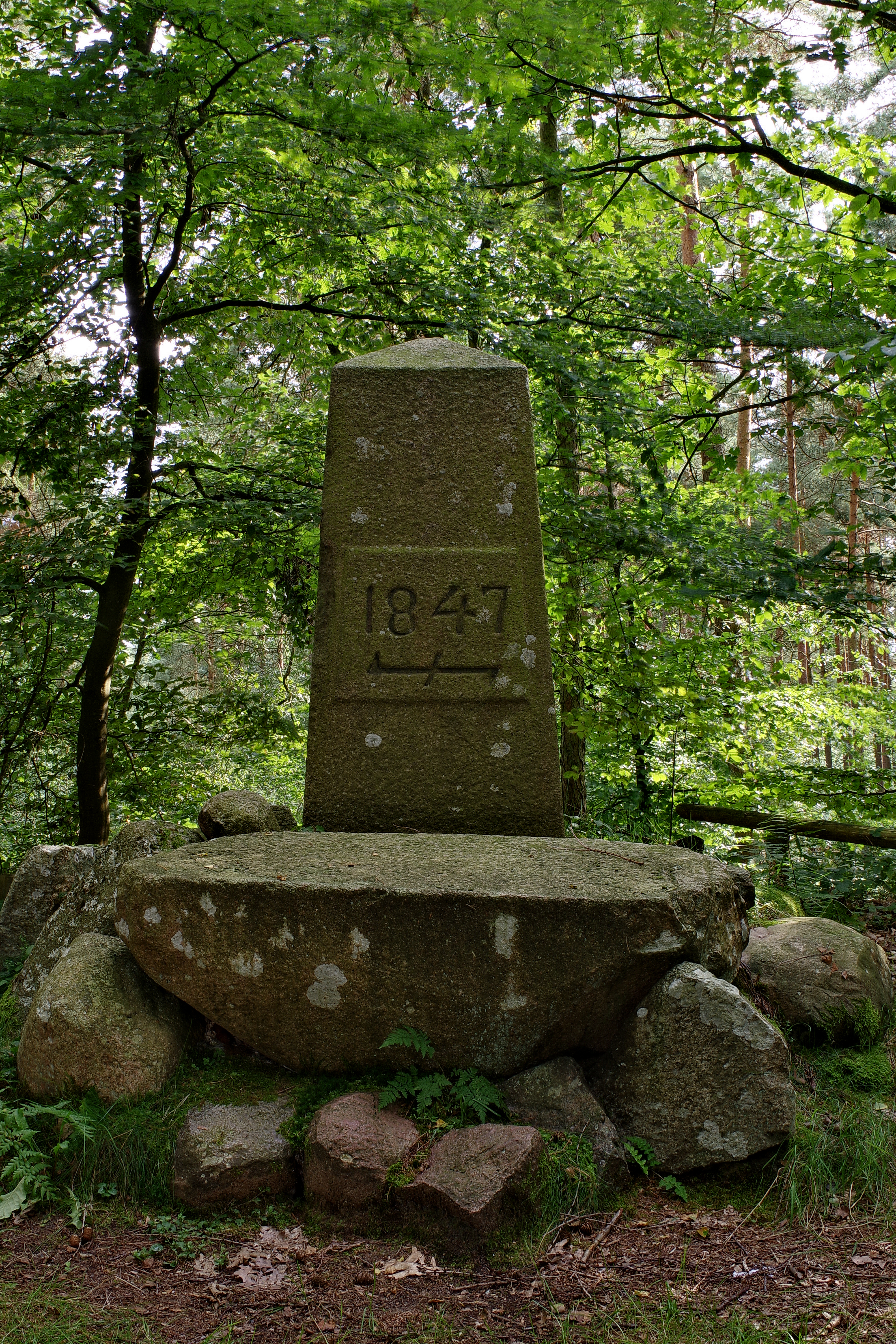 Ernst-August-Rex-Stein auf dem Telegraphenberg im Ortsteil Breetze der Stadt Bleckede - Ansicht aus Richtung Norden. Fast mannshoher Granitobelisk, der die Inbesitzname der von den Breetzer Bauern an den königlichen Domänenfiskus verkauften Heideflächen durch Ernst August I. (König von Hannover, Herzog von Braunschweig-Lüneburg von 1837-1851) im Jahre 1847 dokumentiert. Mit dem Verkauf konnten die Bauern die notwendigen Mittel aufbringen, um die auf ihren Höfen seit alters her lastenden Verpflichtungen nach der erfolgten Verkoppelung im Jahre 1838 zu löschen. Vor dem Hintergrund der nach der Inbesitznahme beginnenden Aufforstung des Areals ist das Wolfsangelzeichen als Herrschaftszeichen im forstlichen Kontext zu sehen. (Quelle: - abgerufen am 30.09.2017) Der Stein ist als "Denkst." verzeichnet auf der Online-Karte unter: (einzustellende Hintergrundkarte: DGK5 historisch).